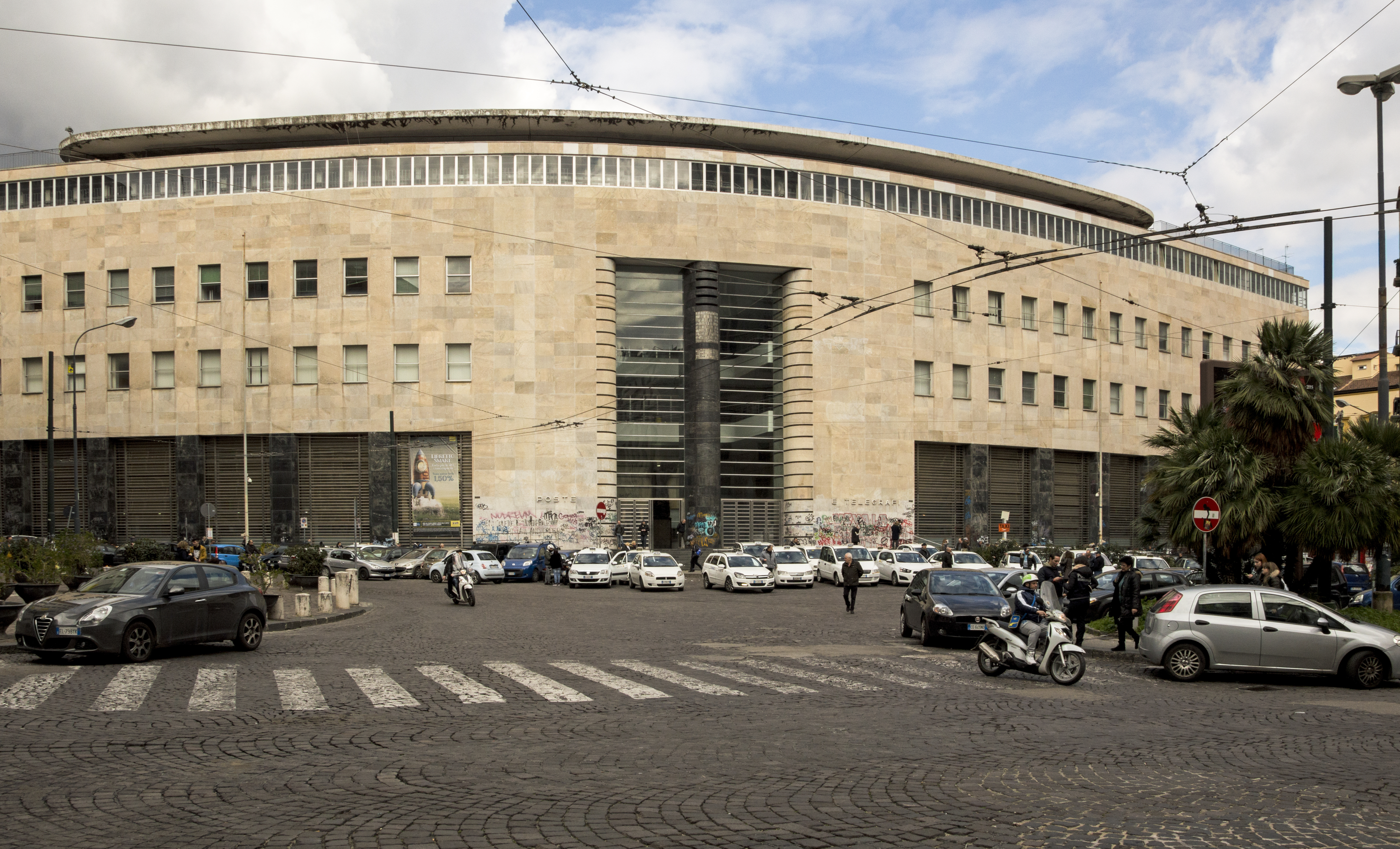 Facciata del Palazzo delle Poste di Napoli